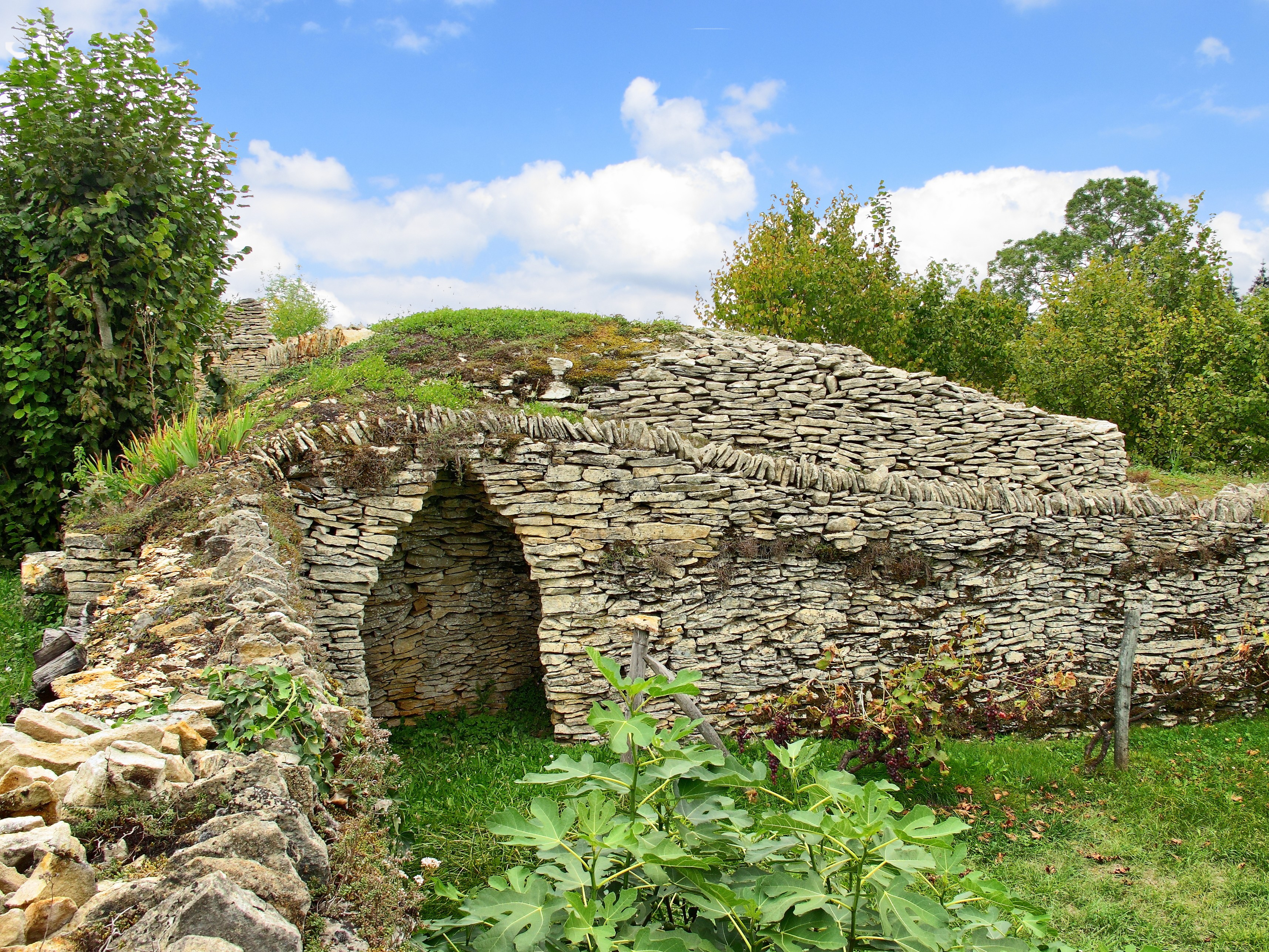 construction en pierre sèche